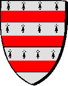 Kergelen